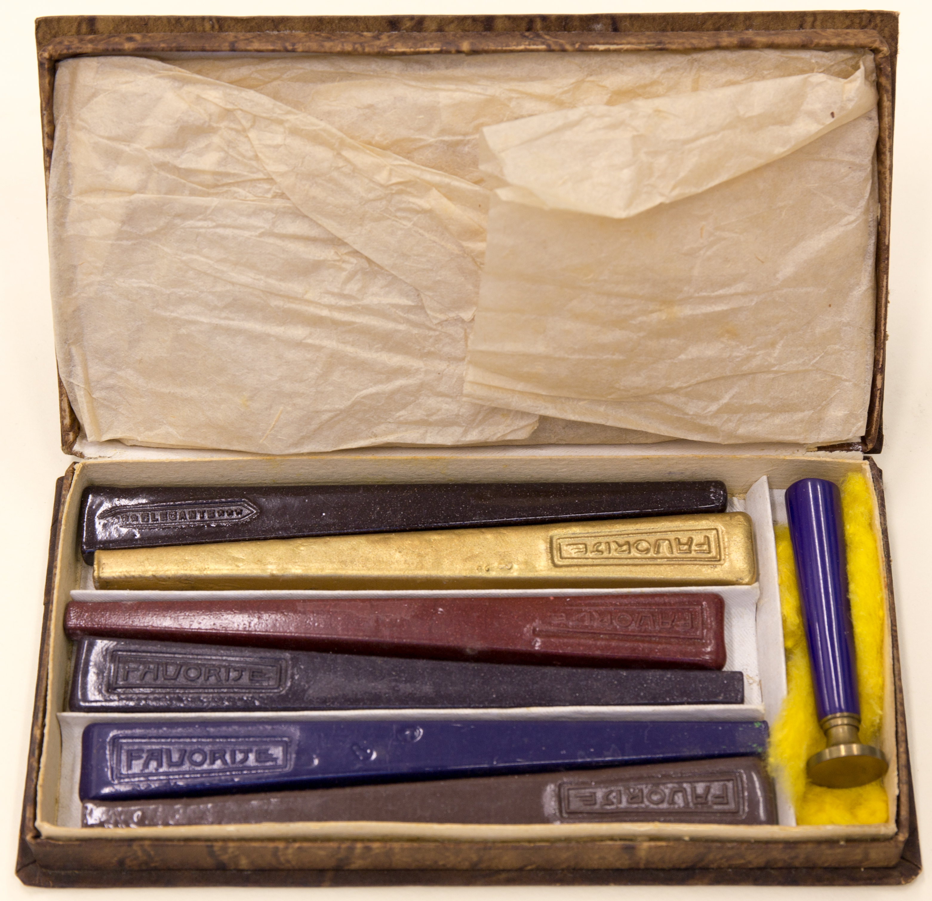 Kästchen mit Siegellack (6) und Petschaft My darling Indetifikations-Nr.: N (9 A 130) 559/1995 Höhe x Breite x Tiefe: 17 x 9 x 2,5 cm Ausgabe: Siegellack, Prägung, Metall, Kunststoff, Pappe, Papier Beschreibung: Querformates Kästchen, Ober- und Unterteil zusammenhängend, mit braunem gemustertem Papier beklebt. Im Unterteil des Kästchens sind drei Fächer für die sechs Stangen Siegellack, die paarweise gegeneinander liegen, weil sie konisch zur Spitze verlaufen. Sich verschiedene Farben, vor allem Brauntöne, die oberste Stange trägt die Prägung ELEGANTE sonst FAVORITE. Beiliegend eine Petschaft mit einen lila Kunststoffgriff.